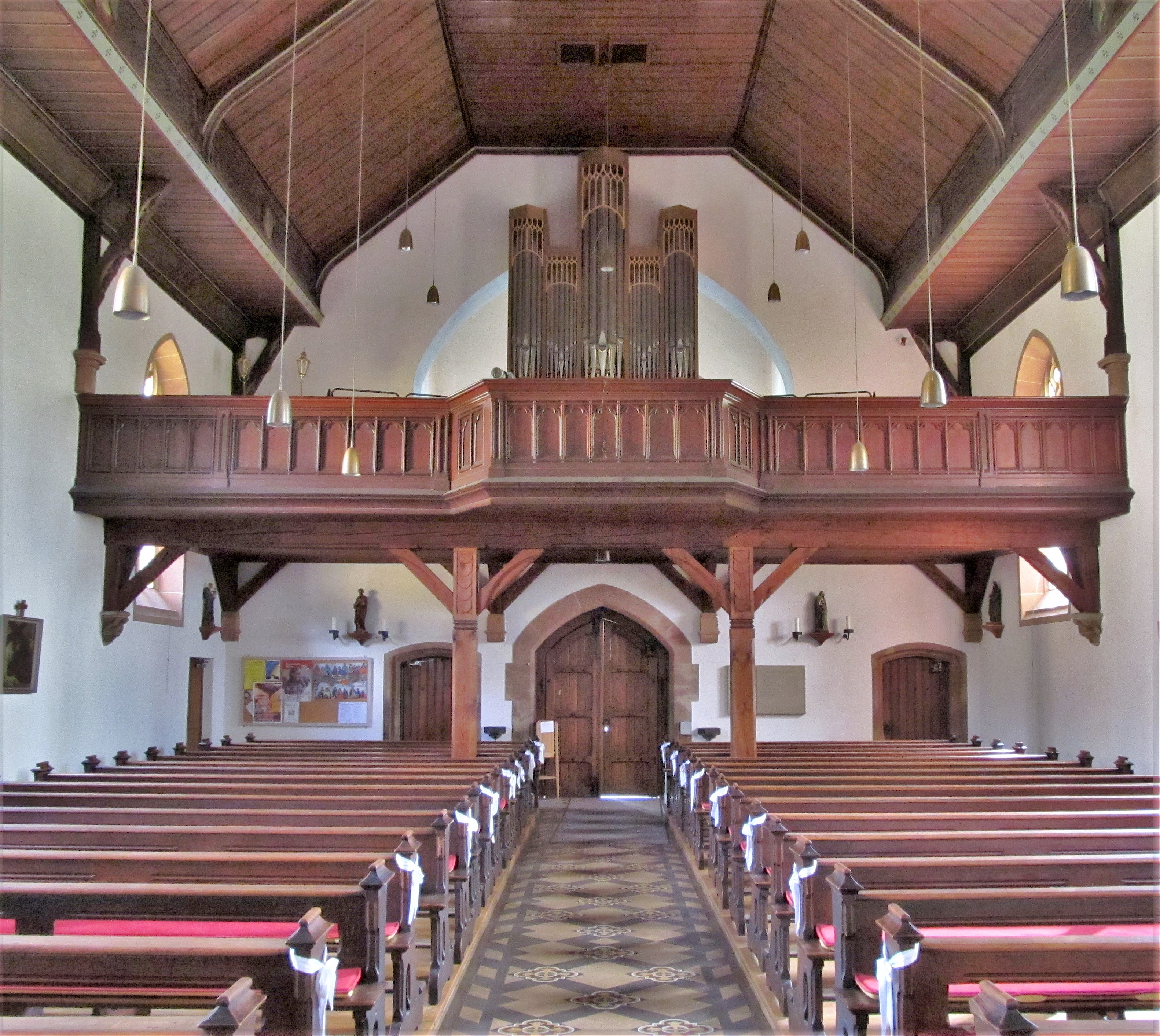 Blick ins Innere der katholischen Pfarrkirche St. Maritius in Erfweiler-Ehlingen, Gemeinde Mandelbachtal, Saarland